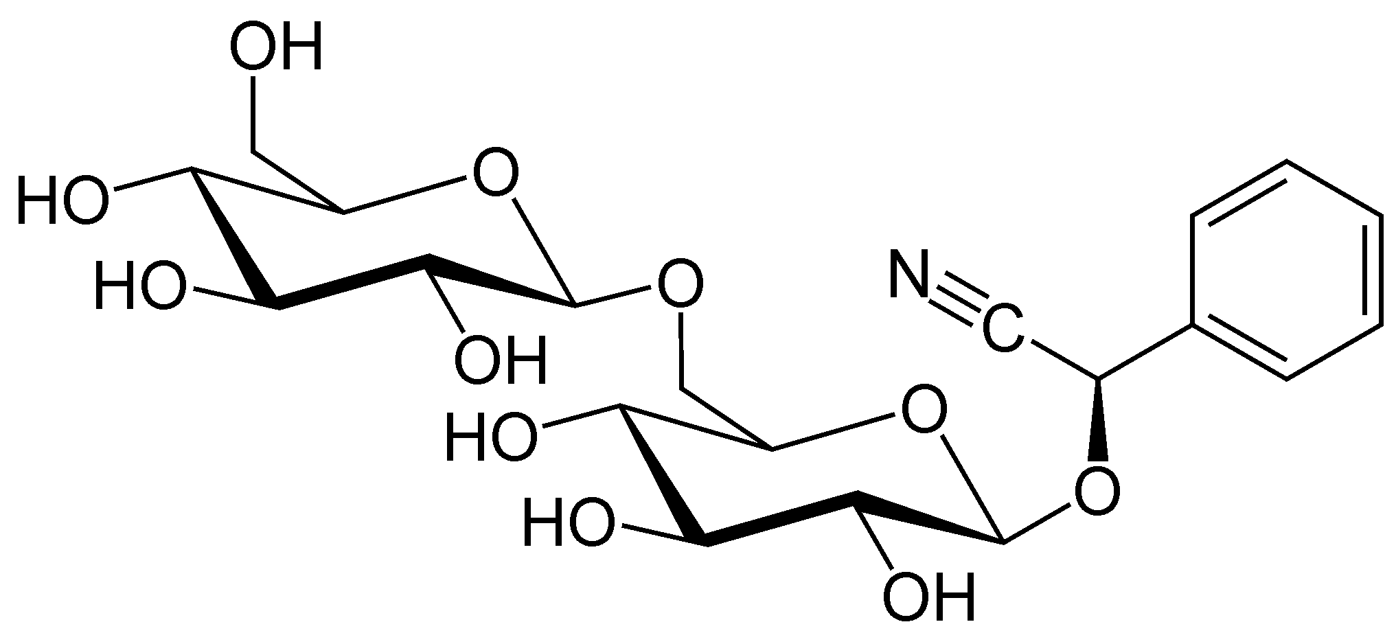 Amygdalin; (R)-Amygdaloside; Amigdalina; D(−)-Mandelonitril- β-D-gentiobiosid